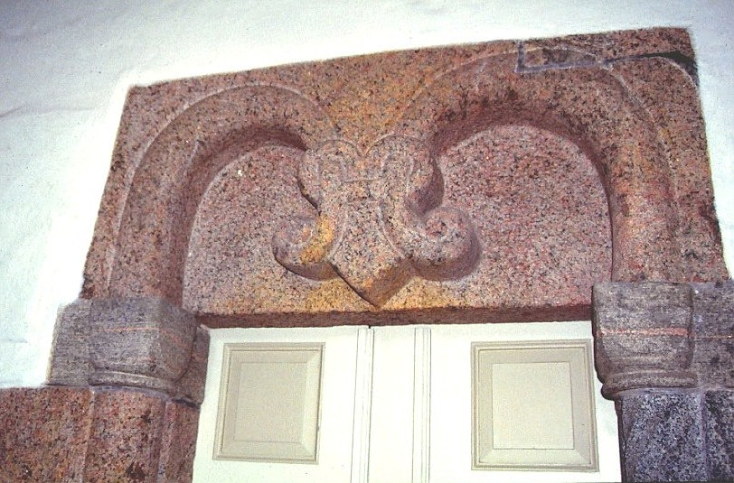 Kousted Kirke i Danmark. Sydportal